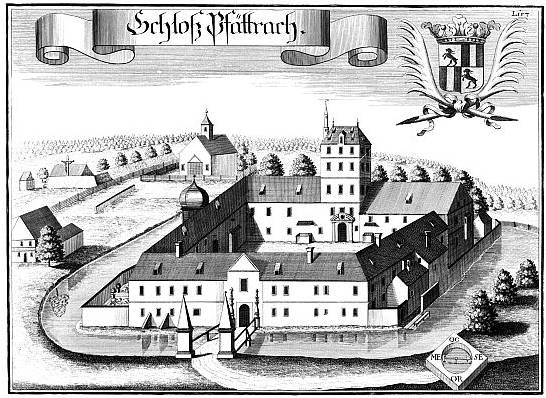 "Schloß Pfättrach" (heute Pfettrach), aus : Beschreibung des Churfürsten- und Hertzogthumbs Ober- und Nidern Bayrn. – Rentamt Landshut, 1723.